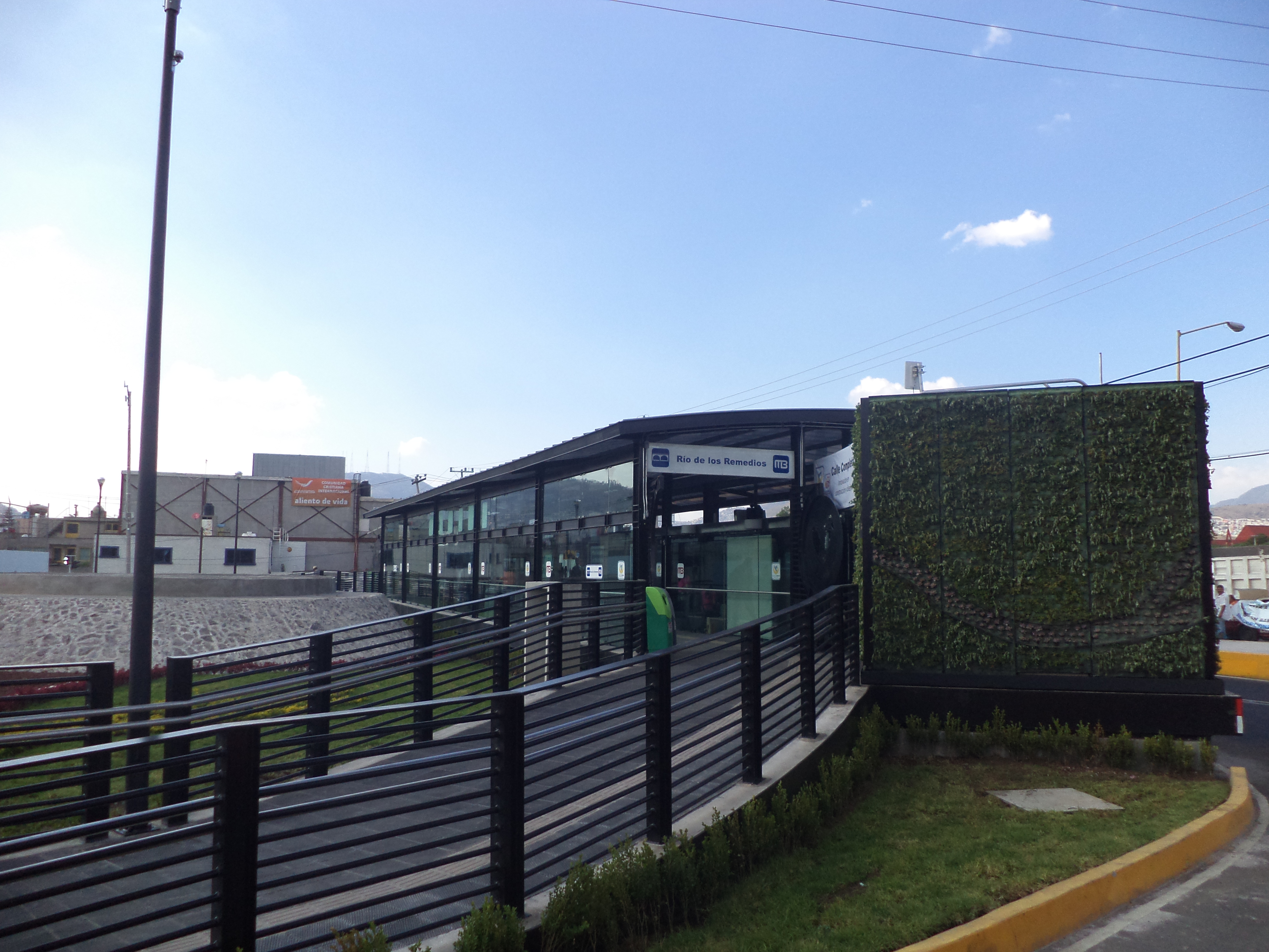 Estacion Rio de los Remedios